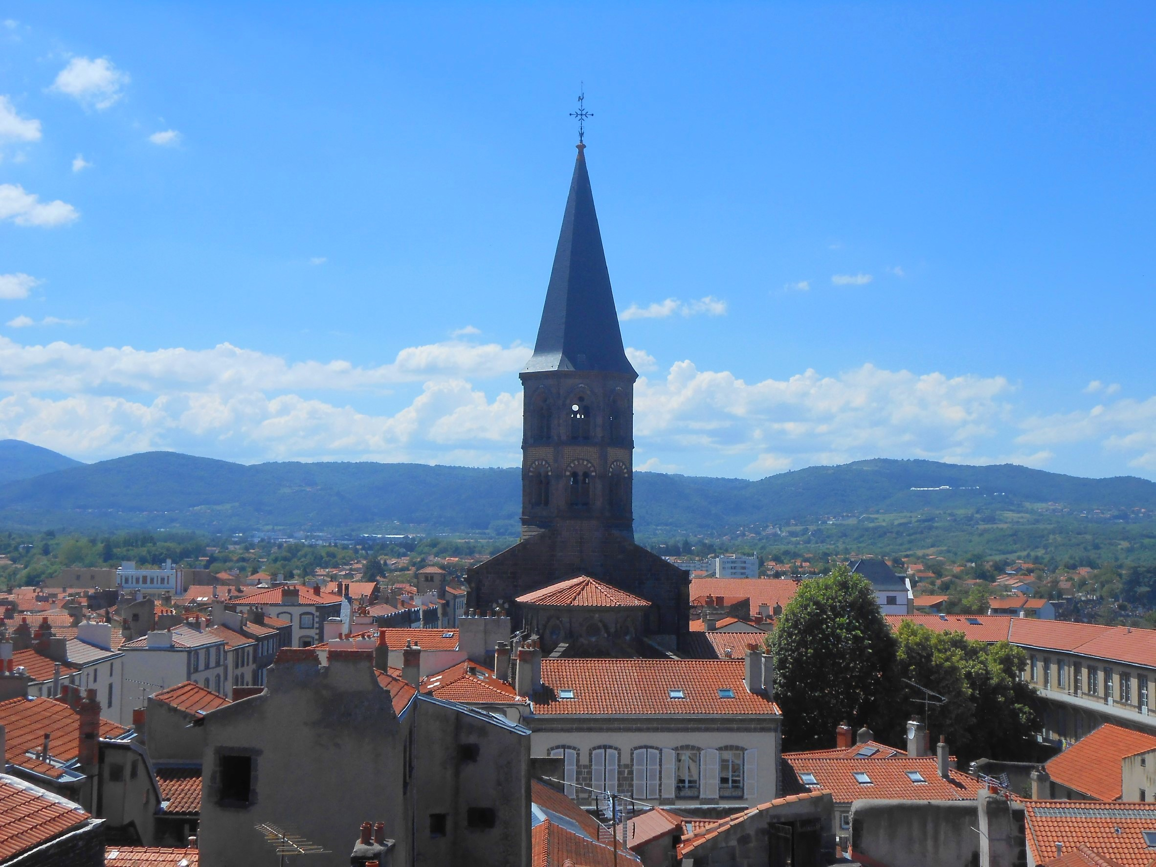 Riom et ses toits.